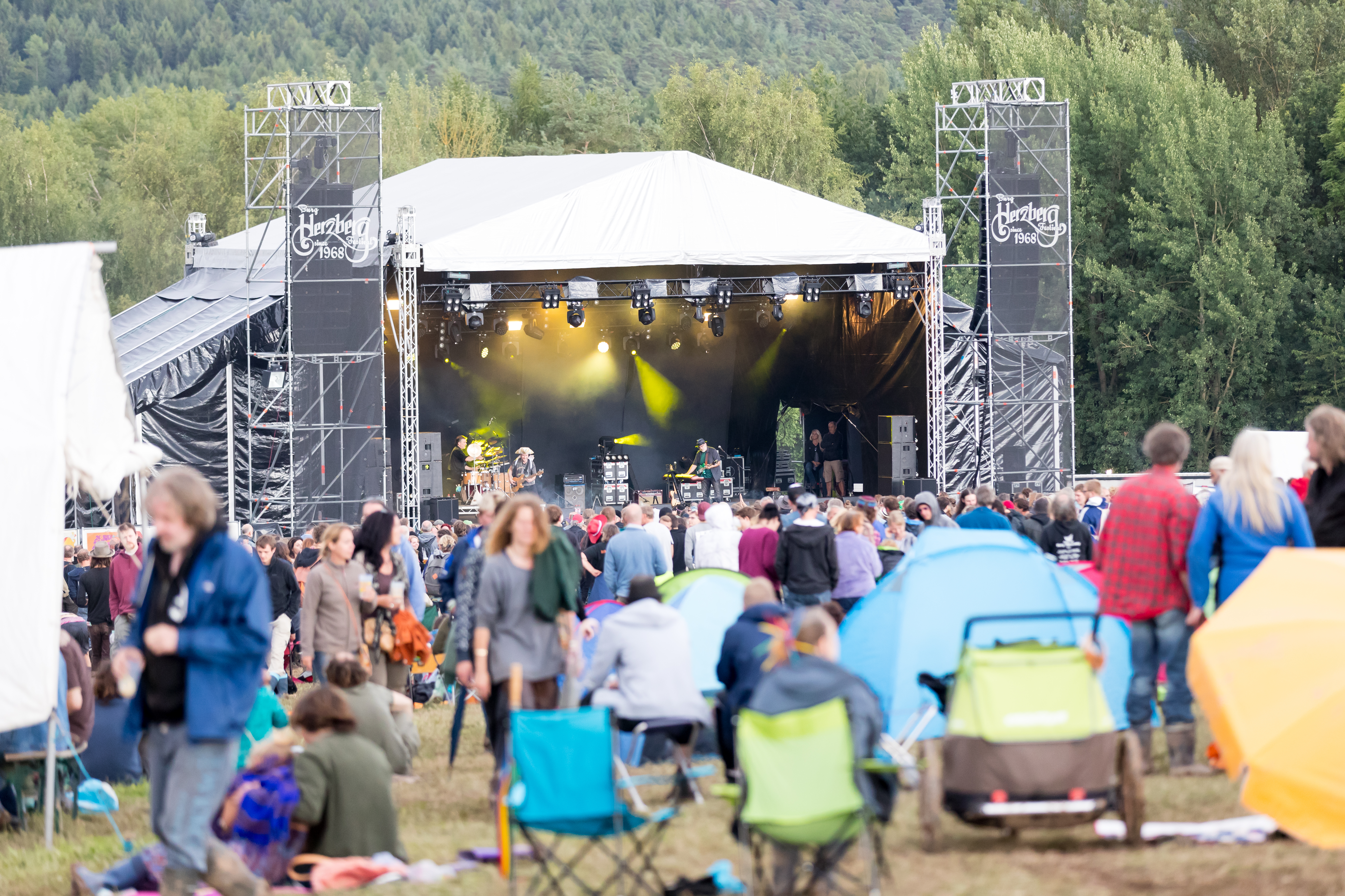 Festivalgelände during Burg Herzberg Festival at Hessen, Breitenbach am Herzberg, , Germany on 2017-07-28, Photo: Sven Mandel